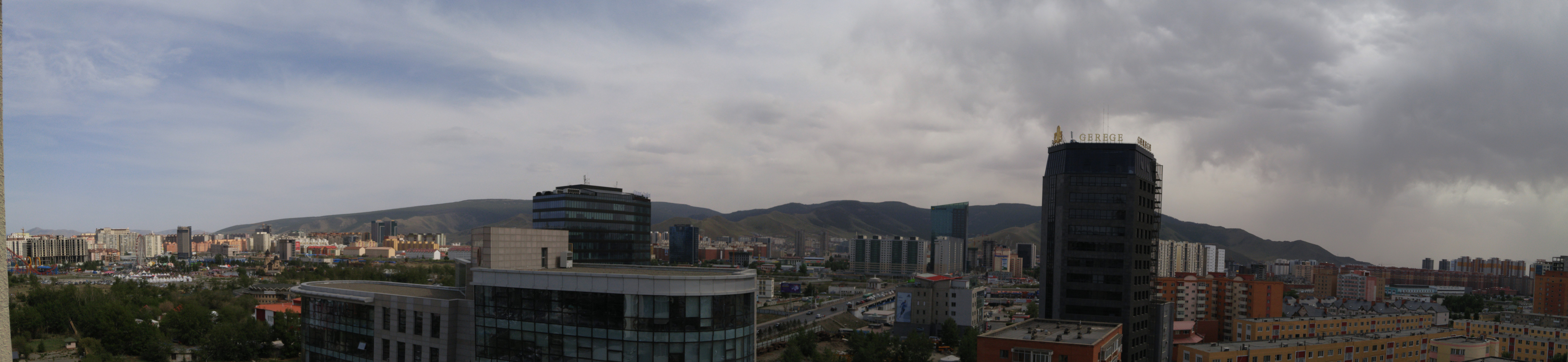 Ein Panorama des Berges Bogd Khan Uul von einem Hochhaus in Ulanbator aus gesehen.